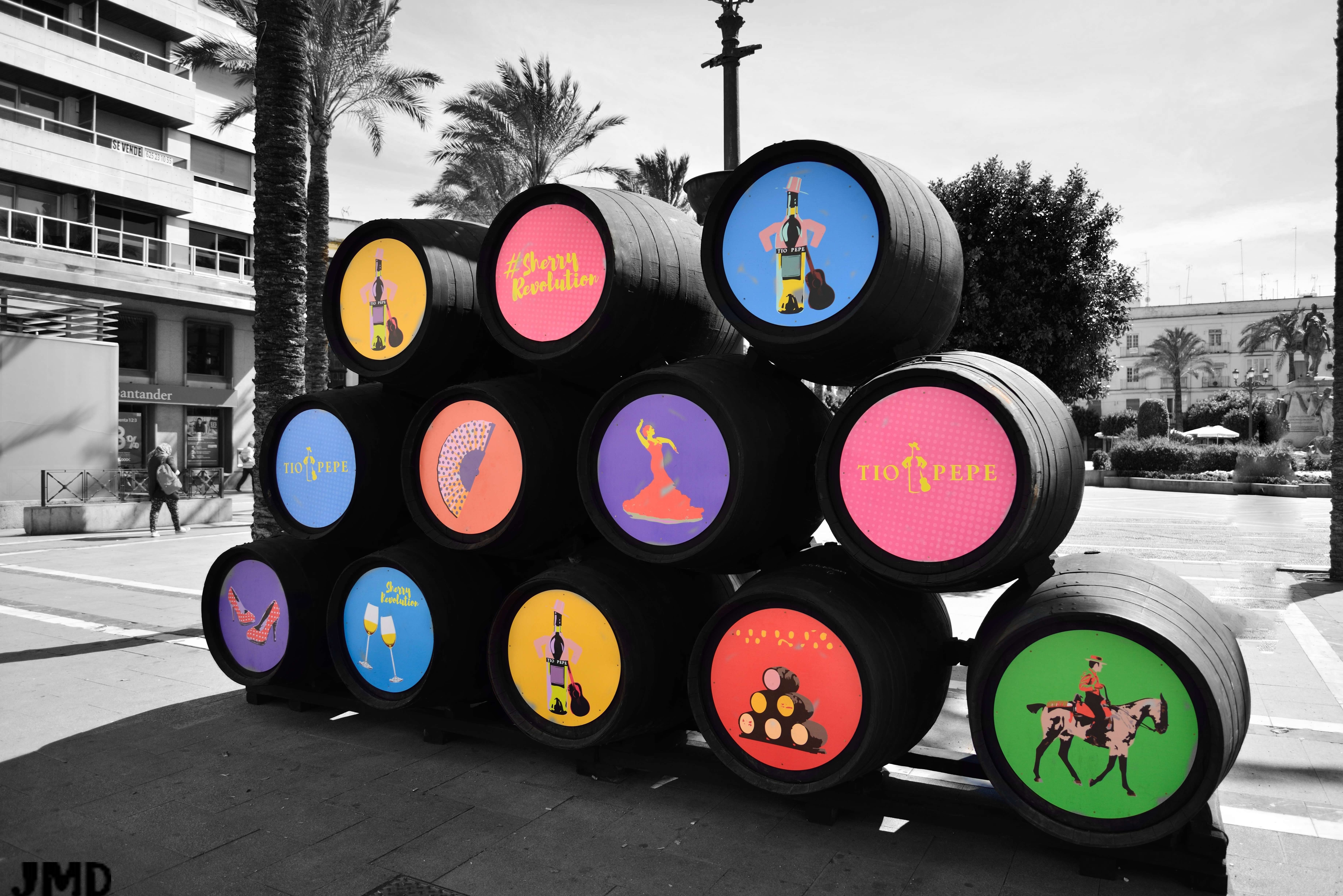 quelque vins de Jerez